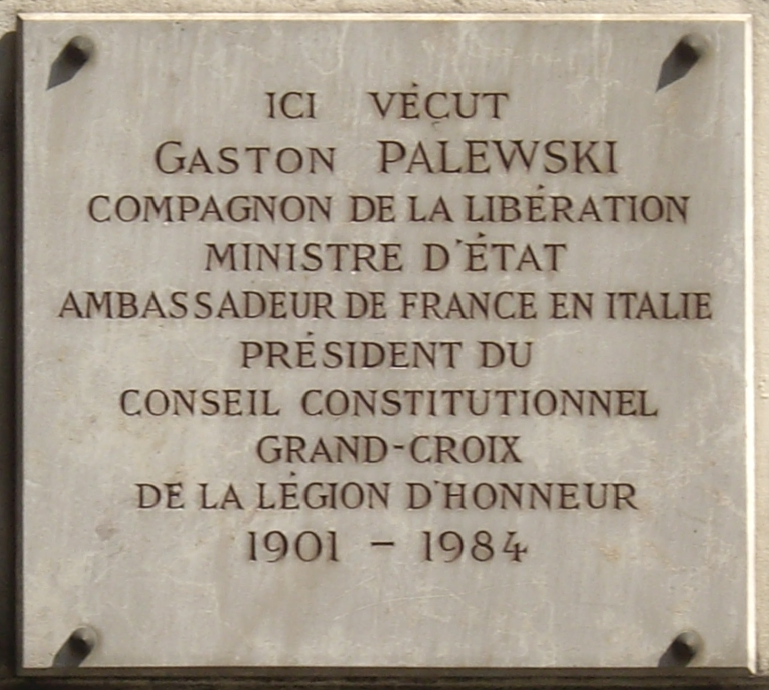 Plaque apposée au n° 1 de la rue Bonaparte, Paris 6e, où vécut l'homme politique Gaston Palewski (1901-1984).